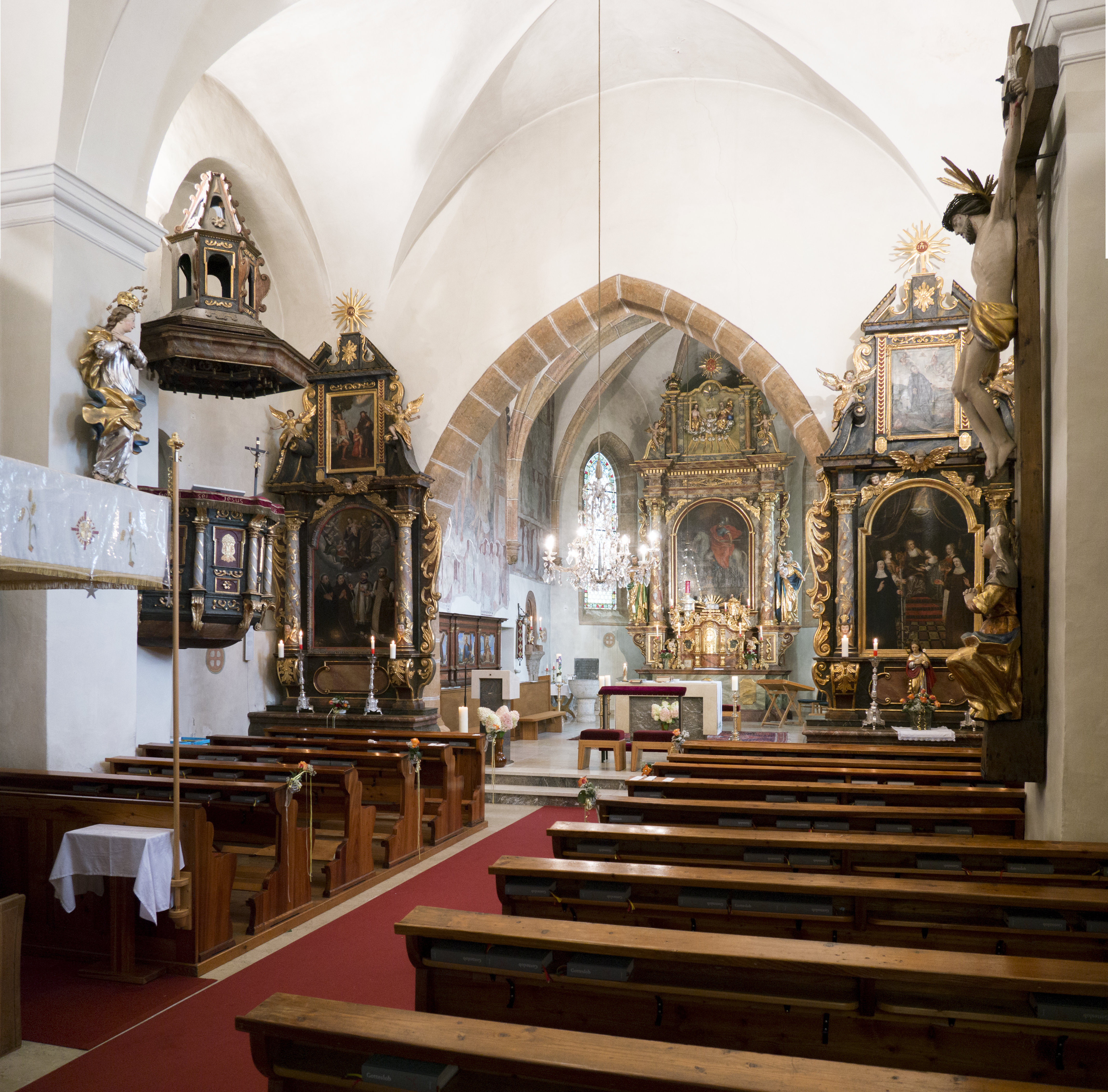 Kath. Pfarrkirche hl. Martin